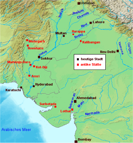 Karte mit Stätten der Harappa-Kultur, selbst erstellt mit Hilfe von